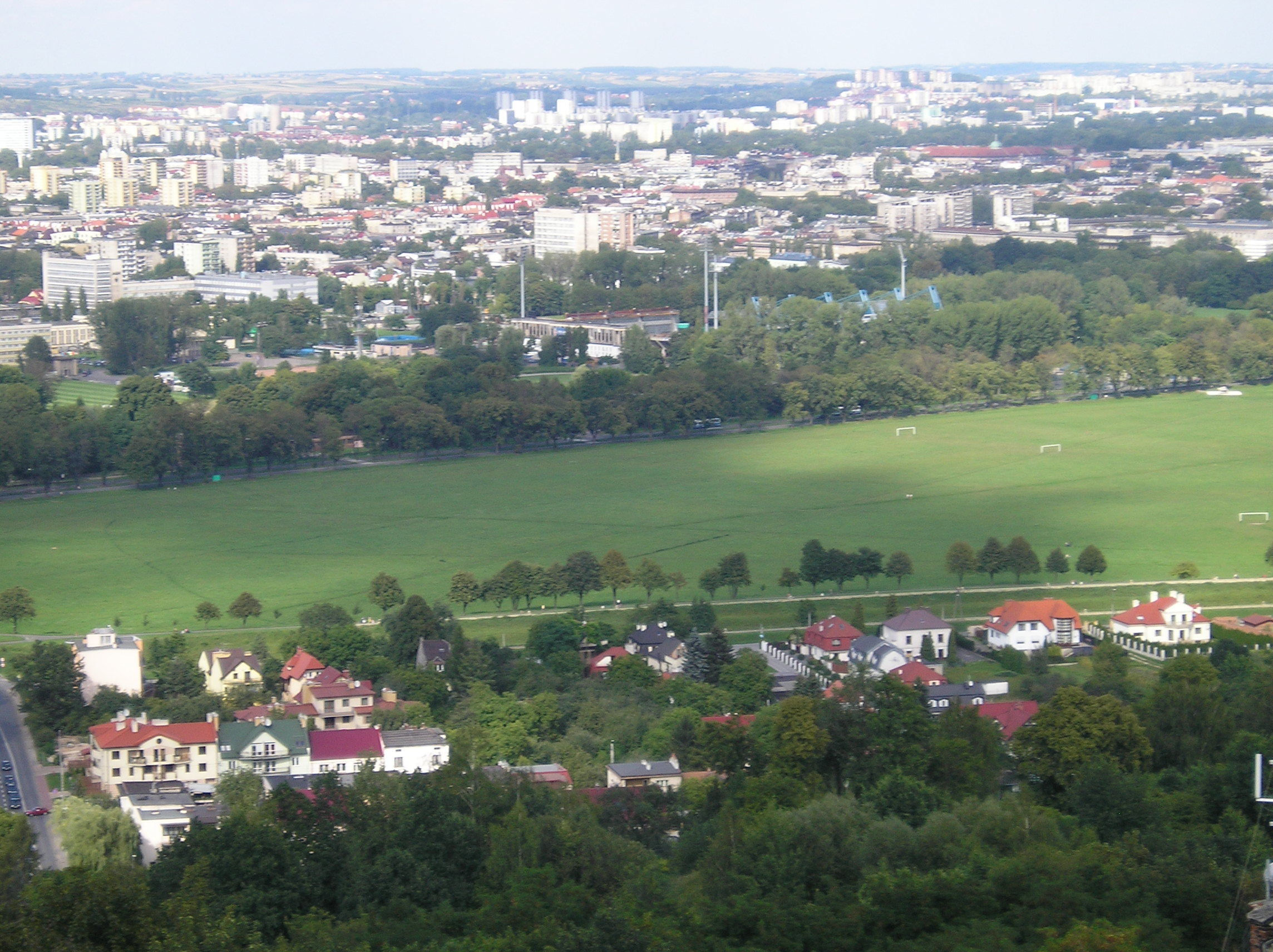 Widok z kopca Kościuszki